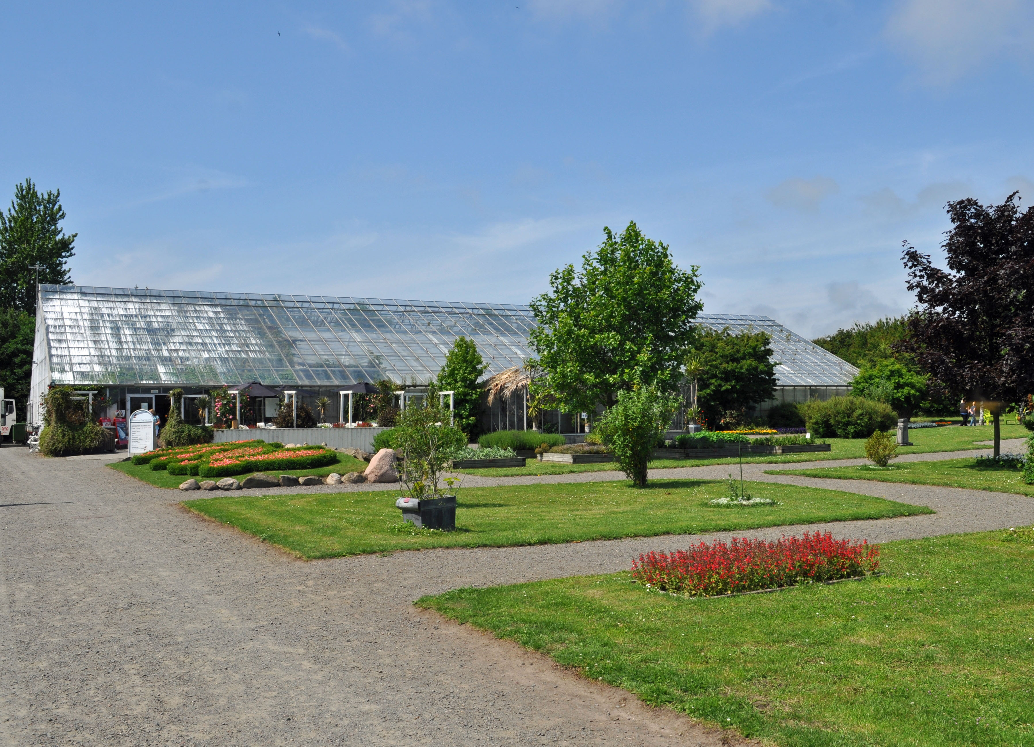 Bornholms Sommerfuglepark og Tropeland Nexø, Bornholm (2012-07-05), by Klugschnacker in Wikipedia (1)